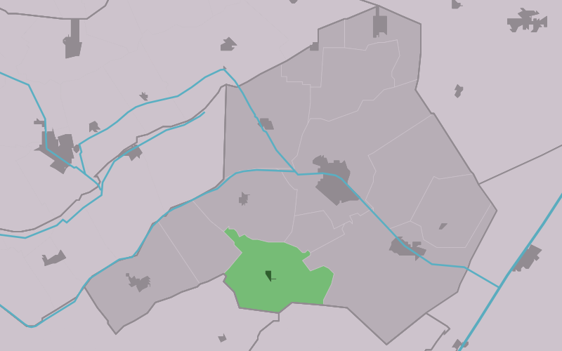 Kaartsje fan himrik fan Elslo